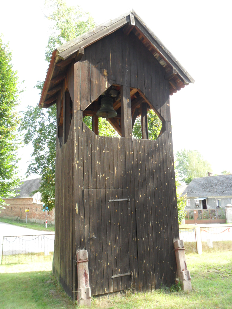 Dzwonnica przy kościele w Chlebowie